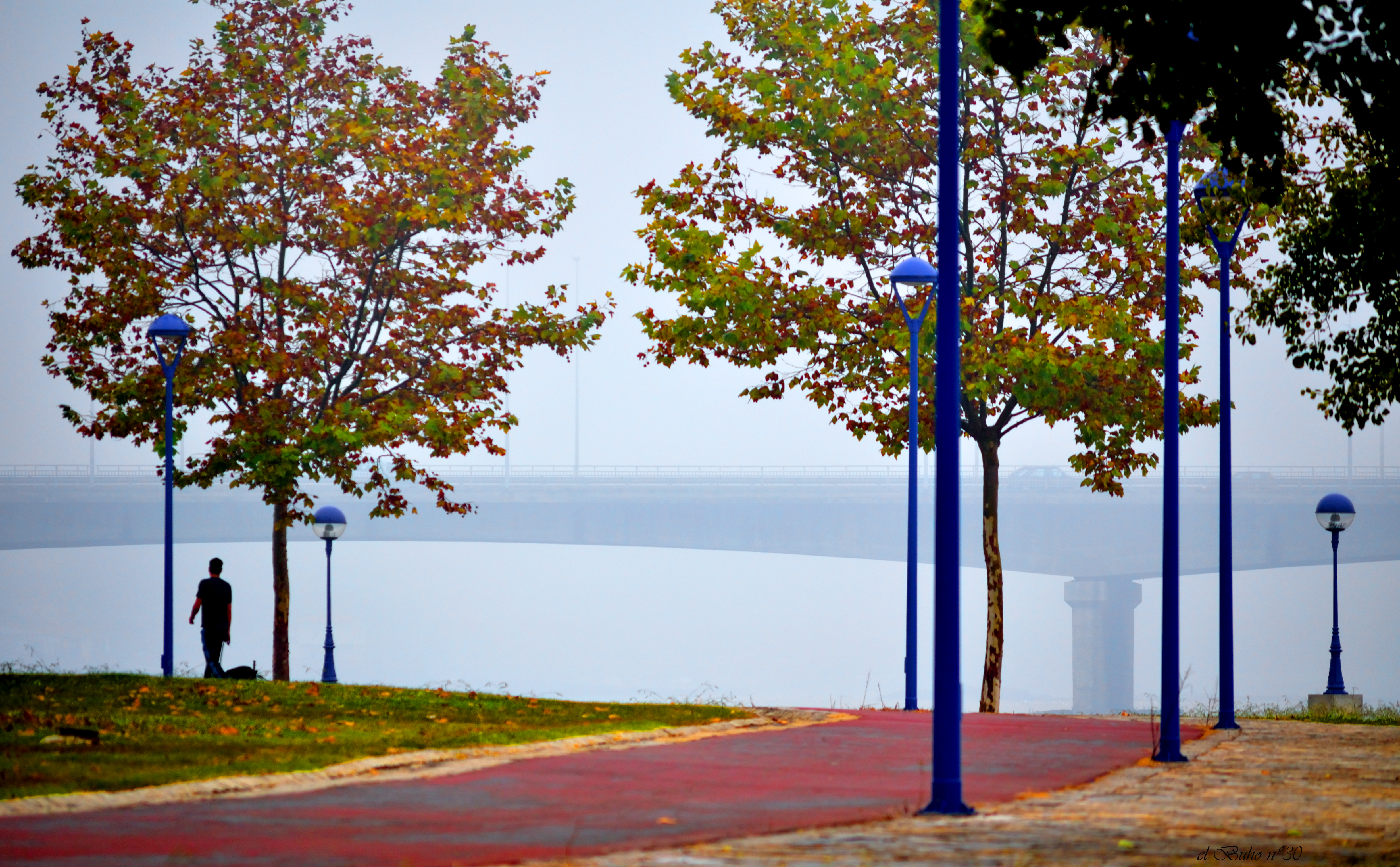 Ponte da Pasaxe, Ría do Burgo, A Coruña